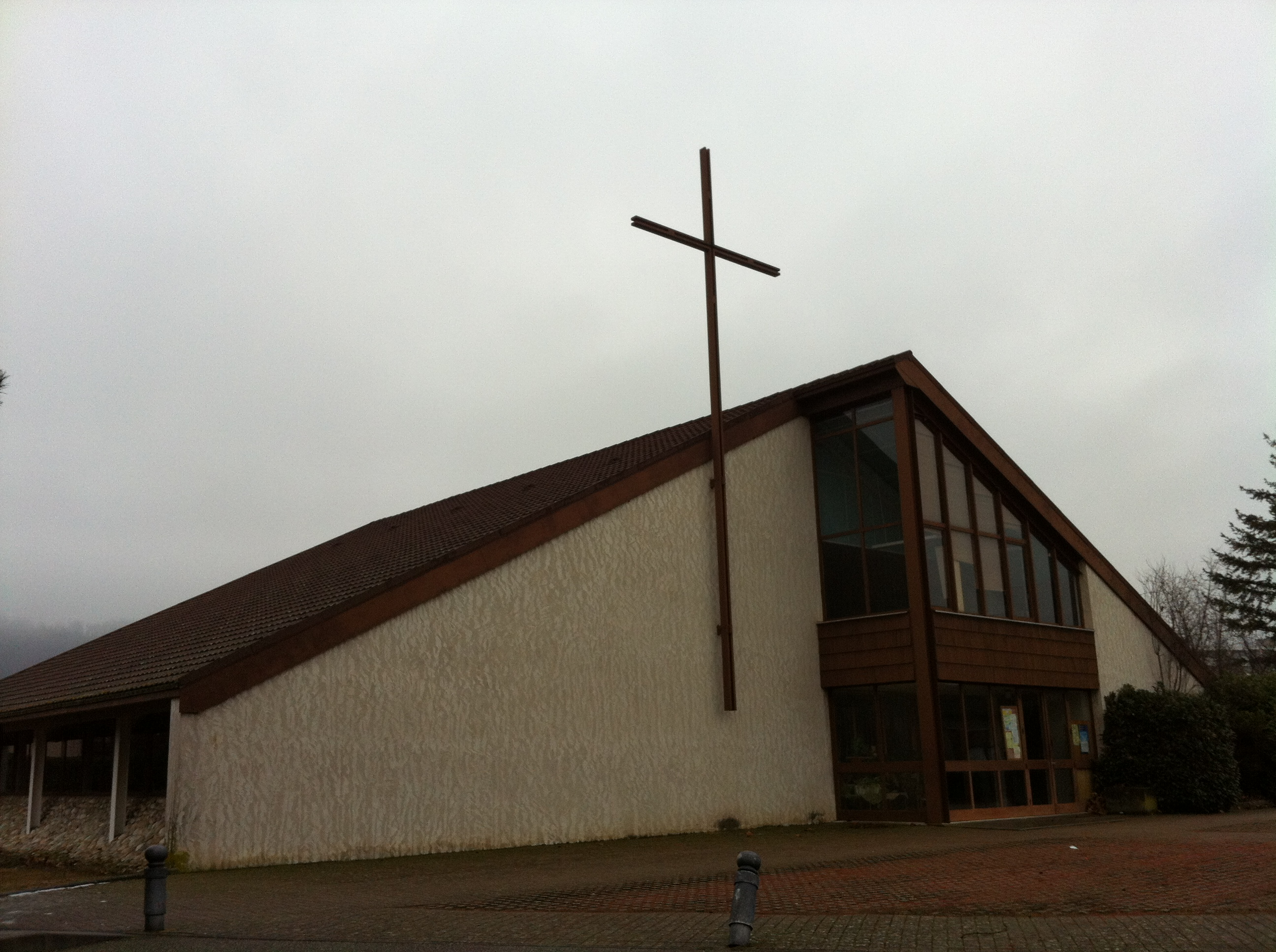 Église Notre-Dame de Saint-Maurice-de-Beynost.